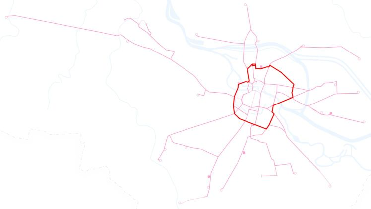 Poglądowa mapka przebiegu linii tramwajowej 0 we Wrocławiu.